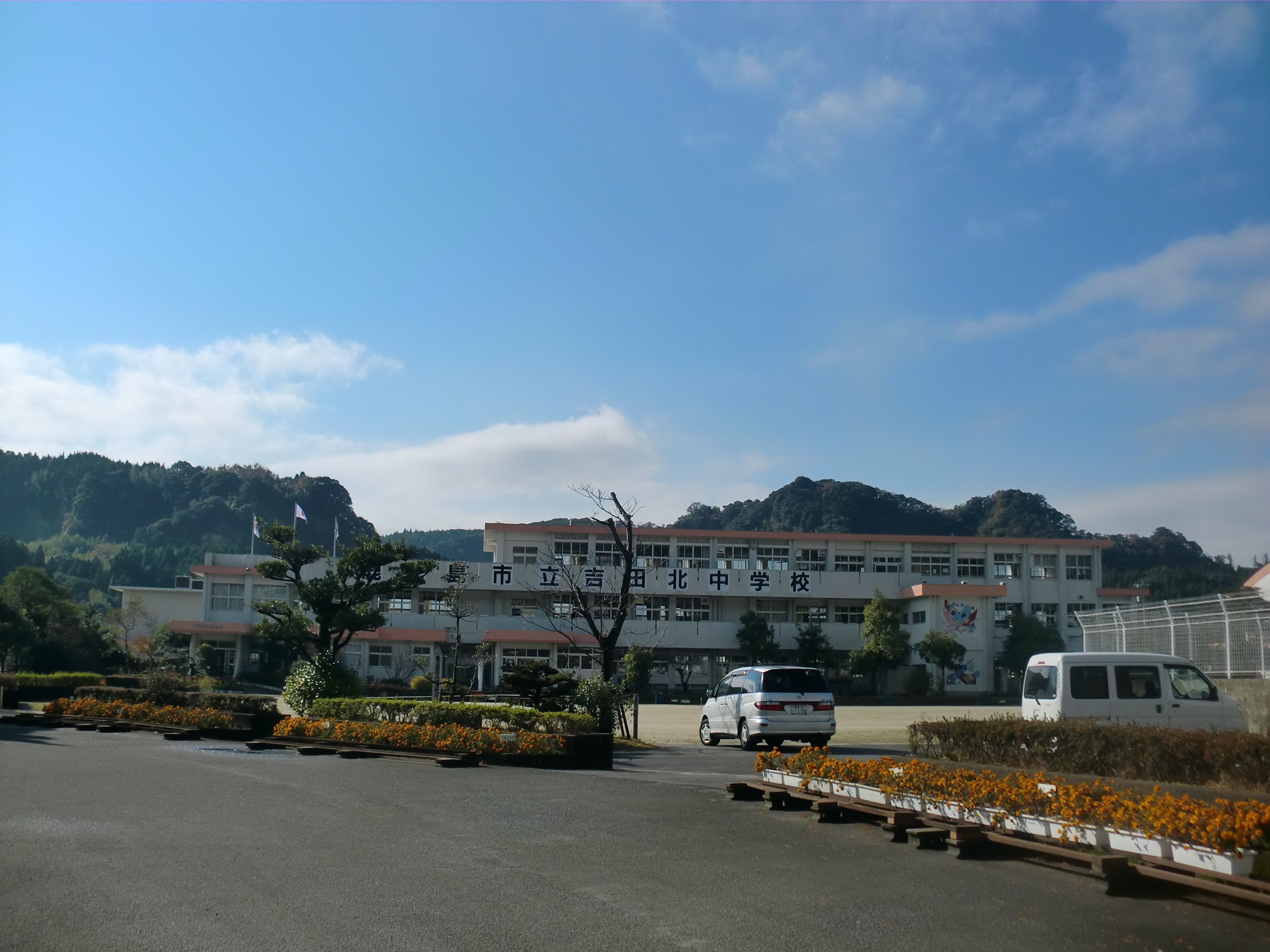 鹿児島市にある吉田北中学校